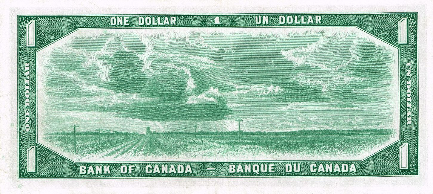 A Bank of Canada 1954-es 1 dollárosának hátoldala préri tájképpel Saskatchewan tartományból.